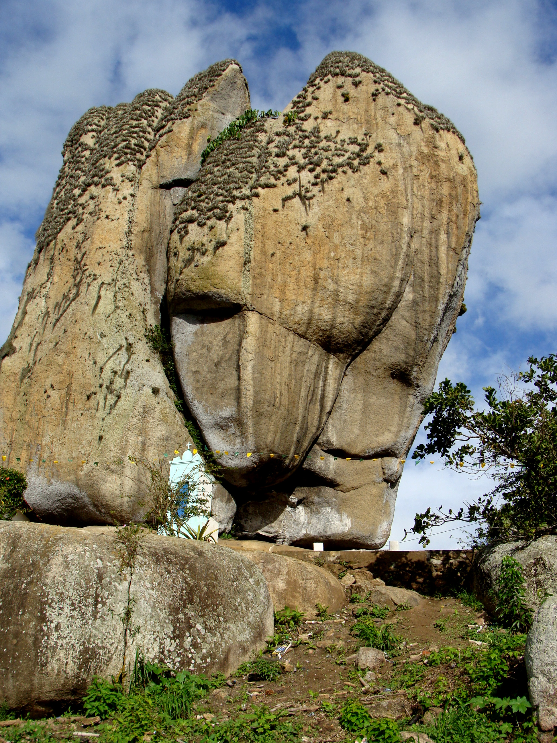 Registro fotográfico da Pedra de Santo Antônio no município de Fagundes, Paraíba. Local de intensa visitação turística.